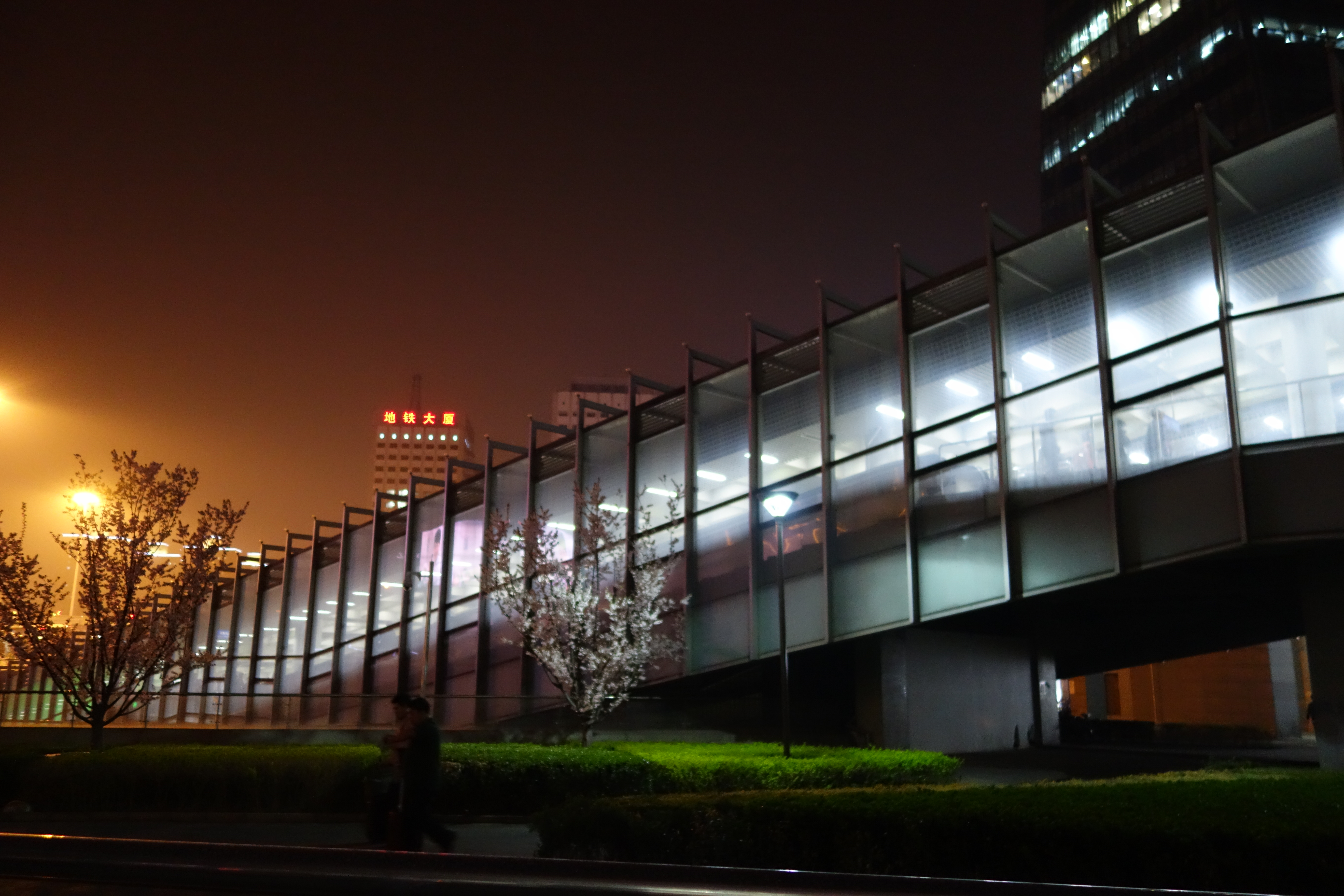 西直门站长换乘通道